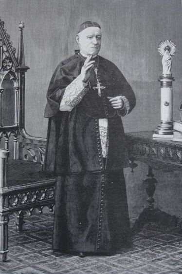 Grabado en blanco y negro que representa al eclesiástico español Francisco de Paula Benavides Fernández de Navarrete (1810-1895), que llegó a ser obispo de Sigüenza, arzobispo de Zaragoza y Patriarca de las Indias Occidentales.